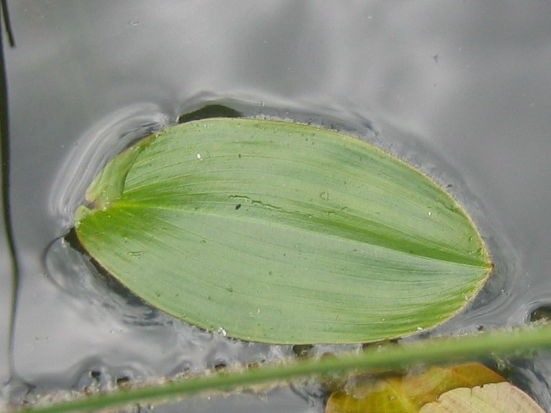 Schwimmendes Laichkraut Potamogeton natans, Müritz-Gebiet